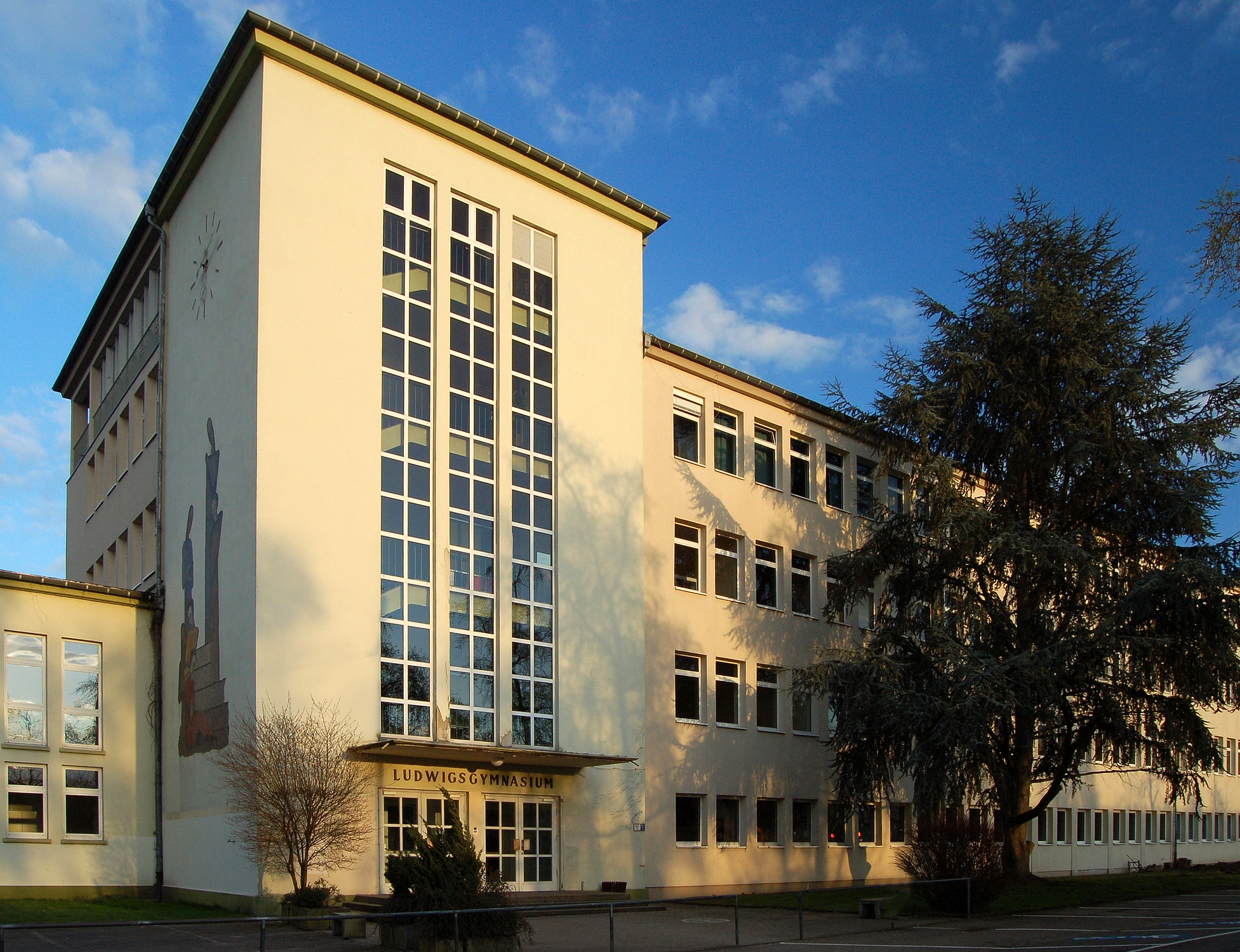 Das Ludwigsgymnasium in Saarbrücken, das älteste Gymnasium des Saarlandes, gegründet im Jahre 1604.